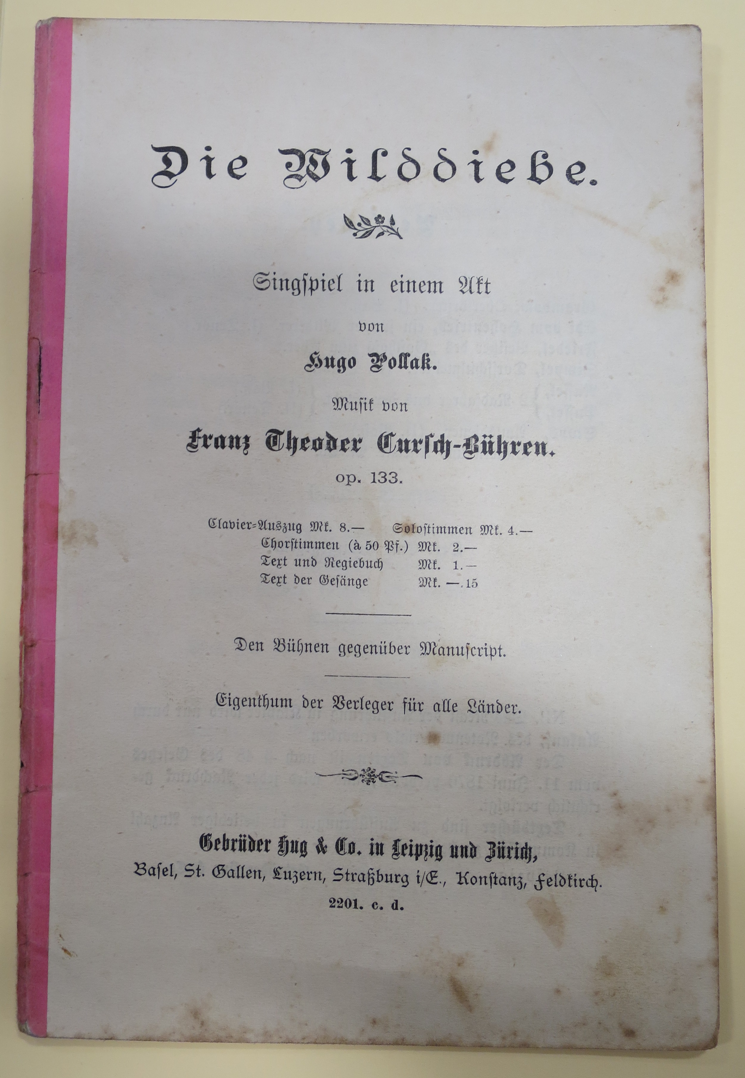 "Die Wilddiebe", Singspiel in einem Akt op. 133, Libretto. (Text: Hugo Pollak, Musik: Franz Theodor Cursch-Bühren)